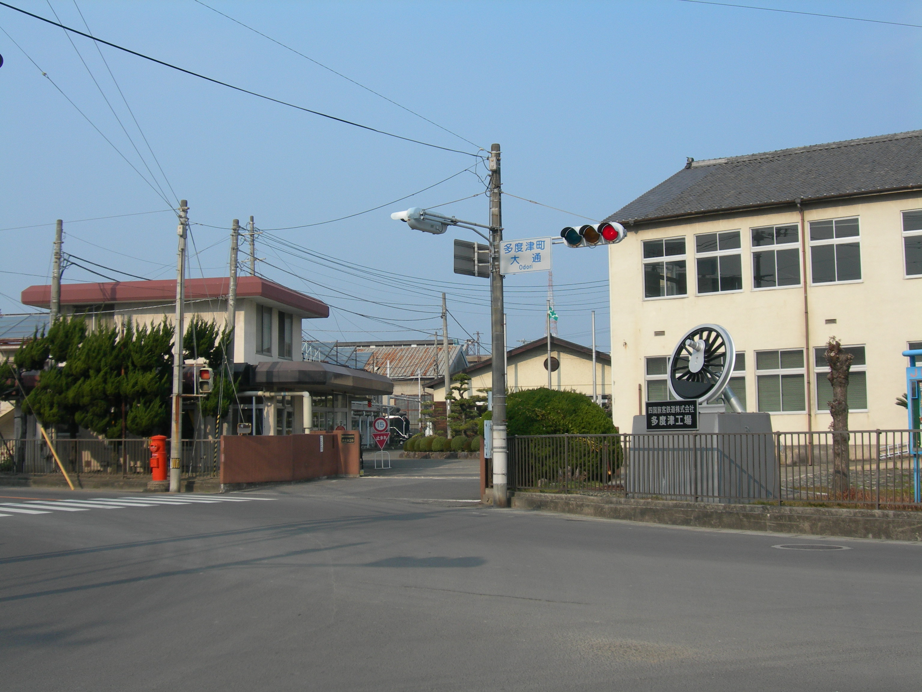 JR四国多度津工場